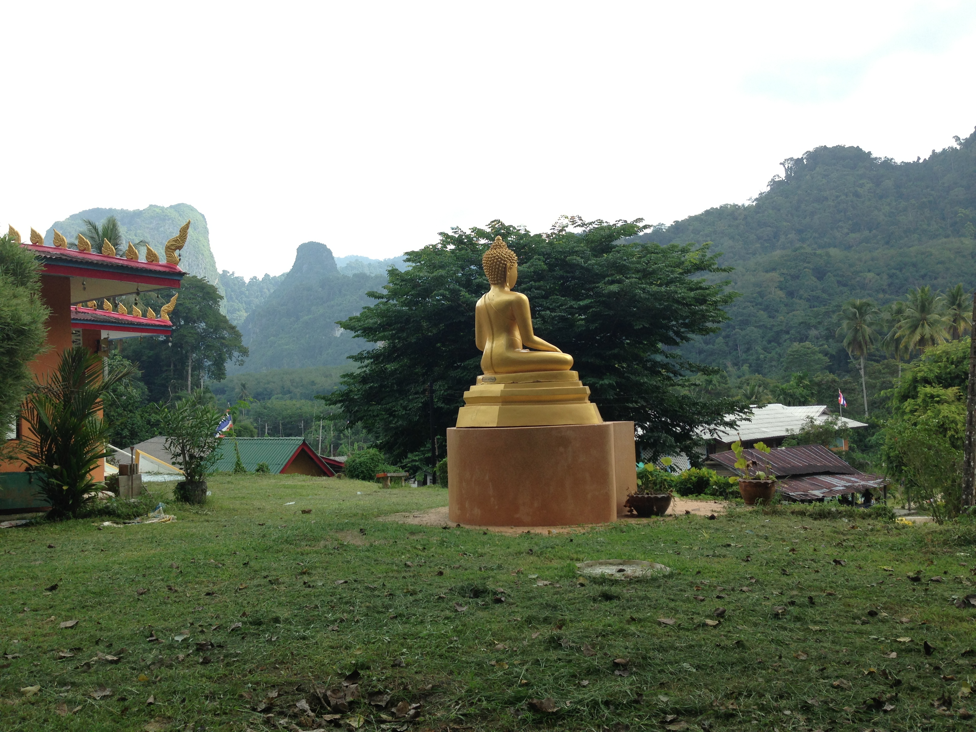 Tham Thalu, Bannang Sata District, Yala, Thailand